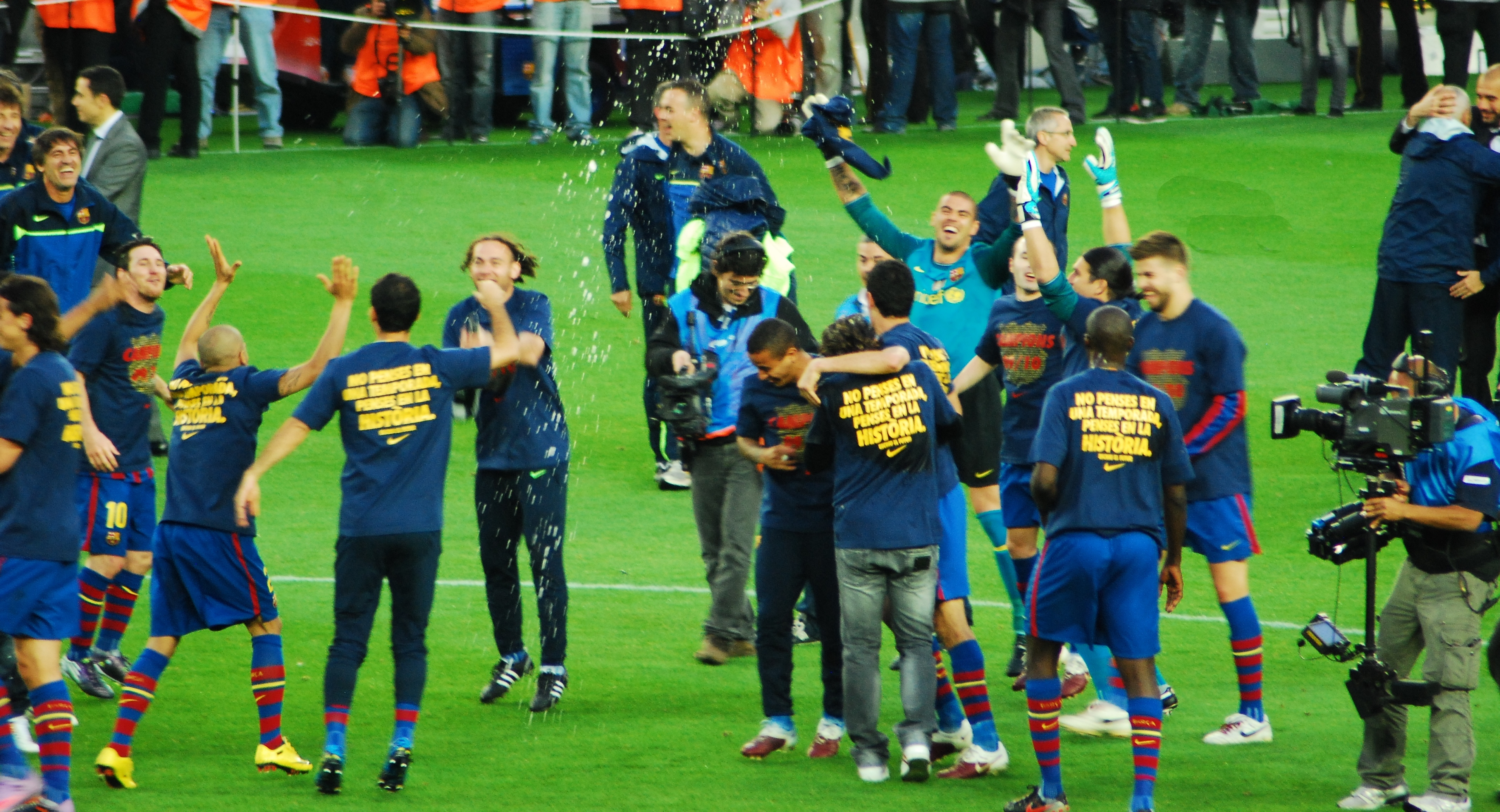 Los jugadores y el cuerpo técnico del FC Barcelona celebran la obtención del titulo liguero de la temporada 2009-2010.